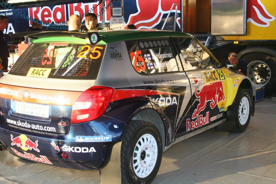 Juho Hänninen Rally Catalunya 2011